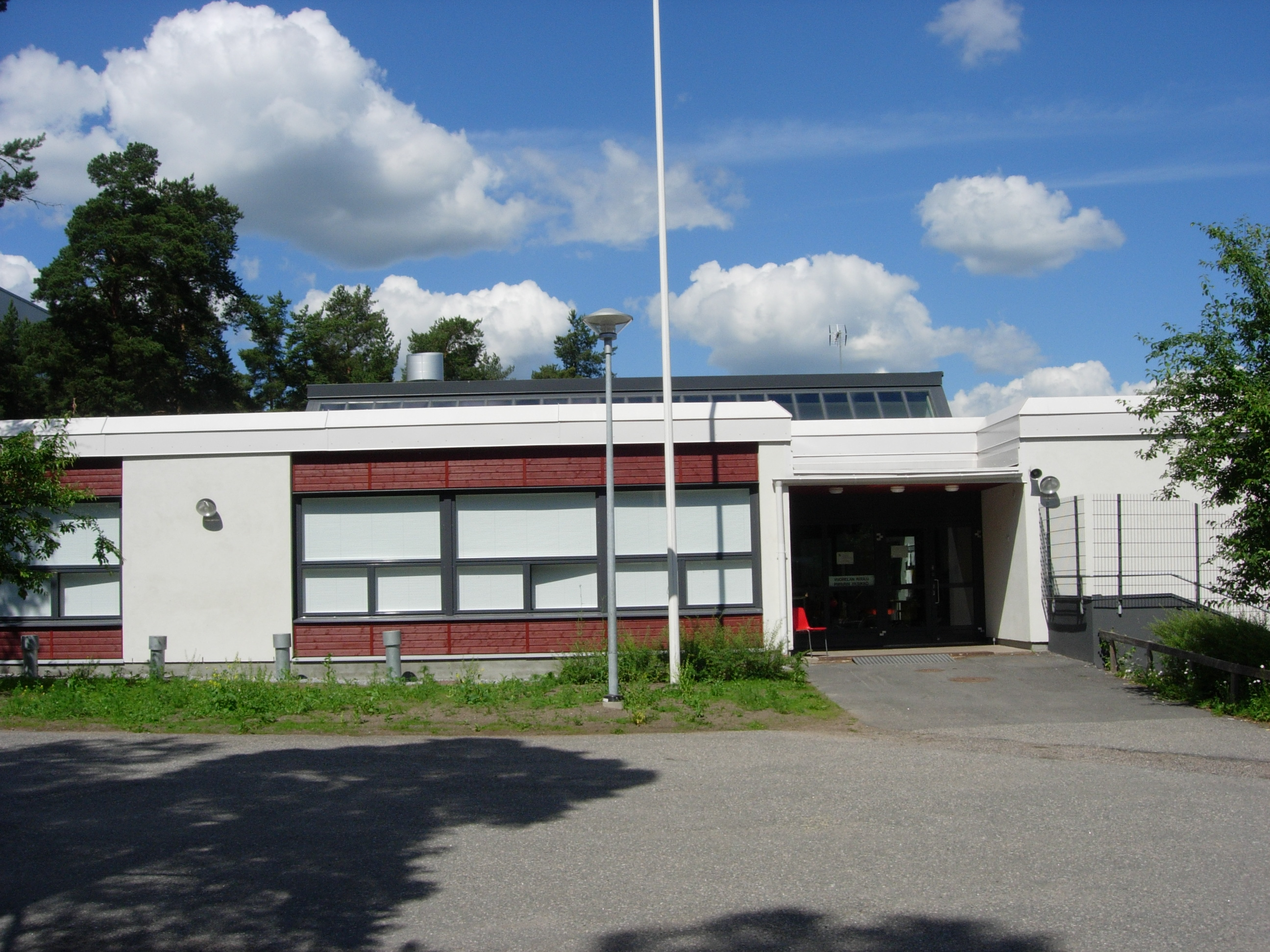 Vuorelan koulun Piiparin yksikkö, Runosmäki, Turku. Koulu autistisille oppilaille.